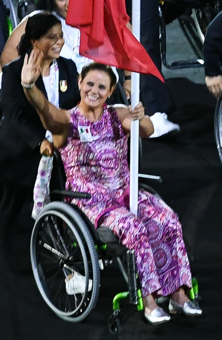 Rio de Janeiro - Cerimônia de abertura dos Jogos Paralmpicos Rio 2016 no Estdio do Maracanã (Tomaz Silva/Agência Brasil)